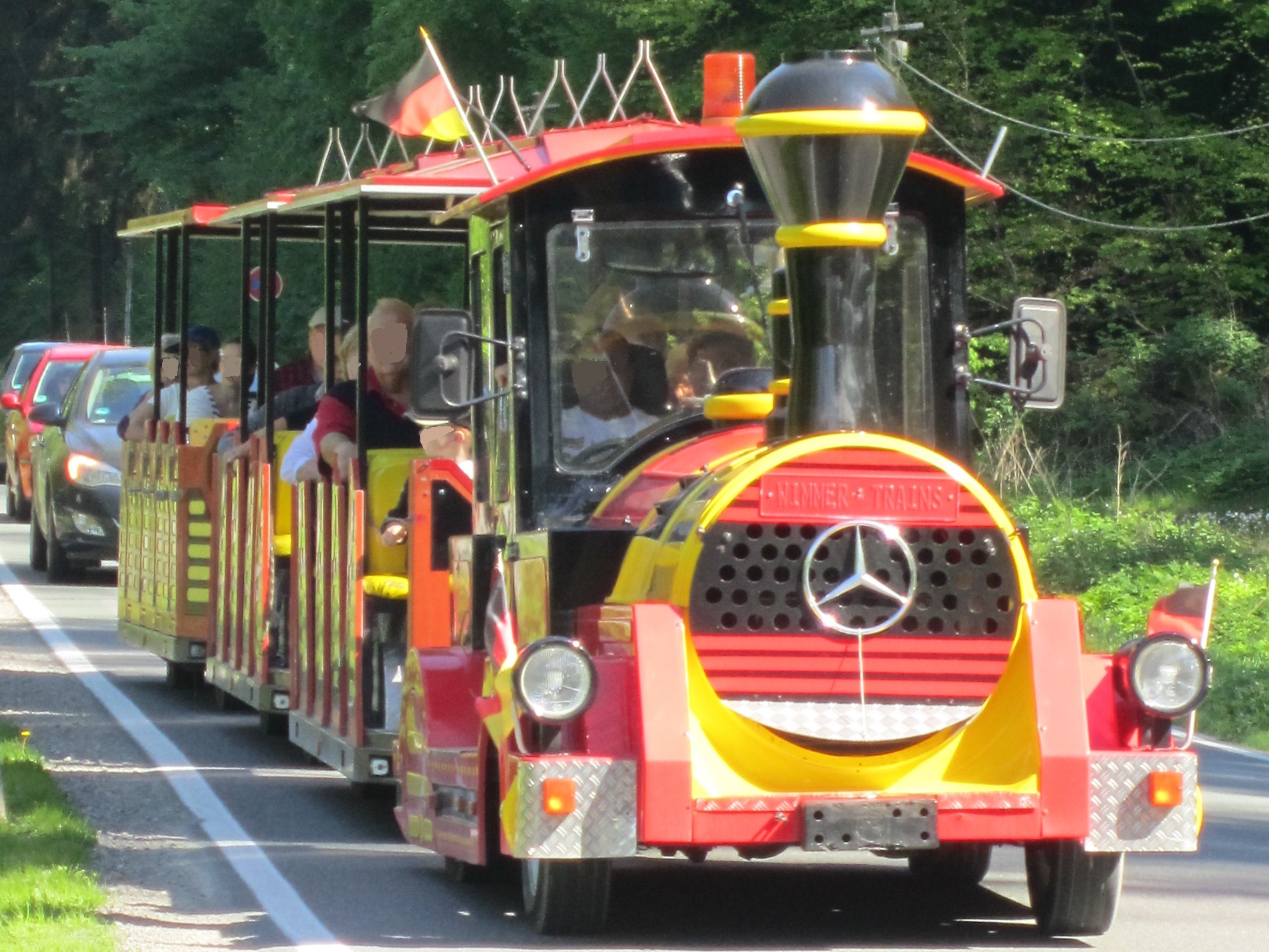 Bimmelbahn auf dem Weg von der Niedersächsischen Landesgartenschau 2018 in Bad Iburg zum Parkplatz